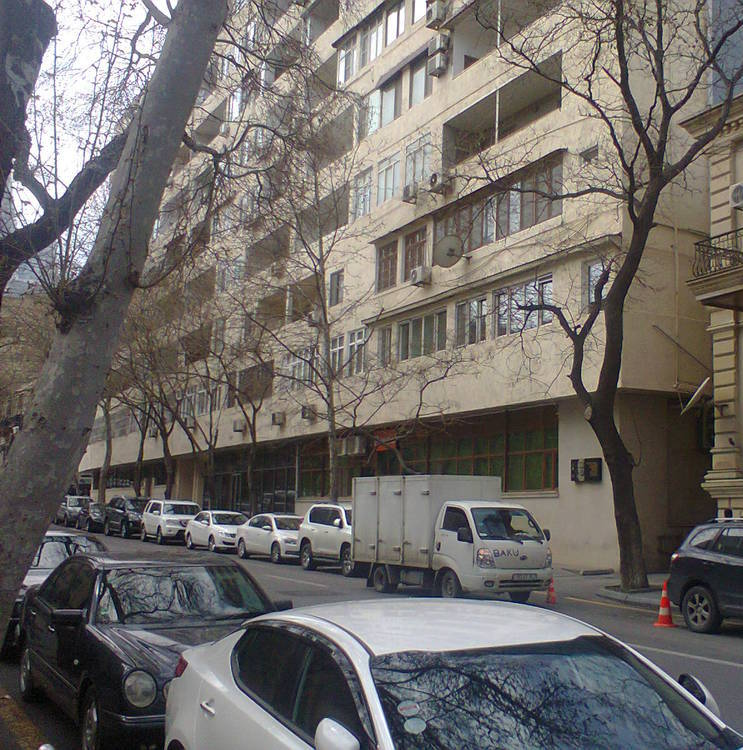 Дом где жил Риад Ахмедов